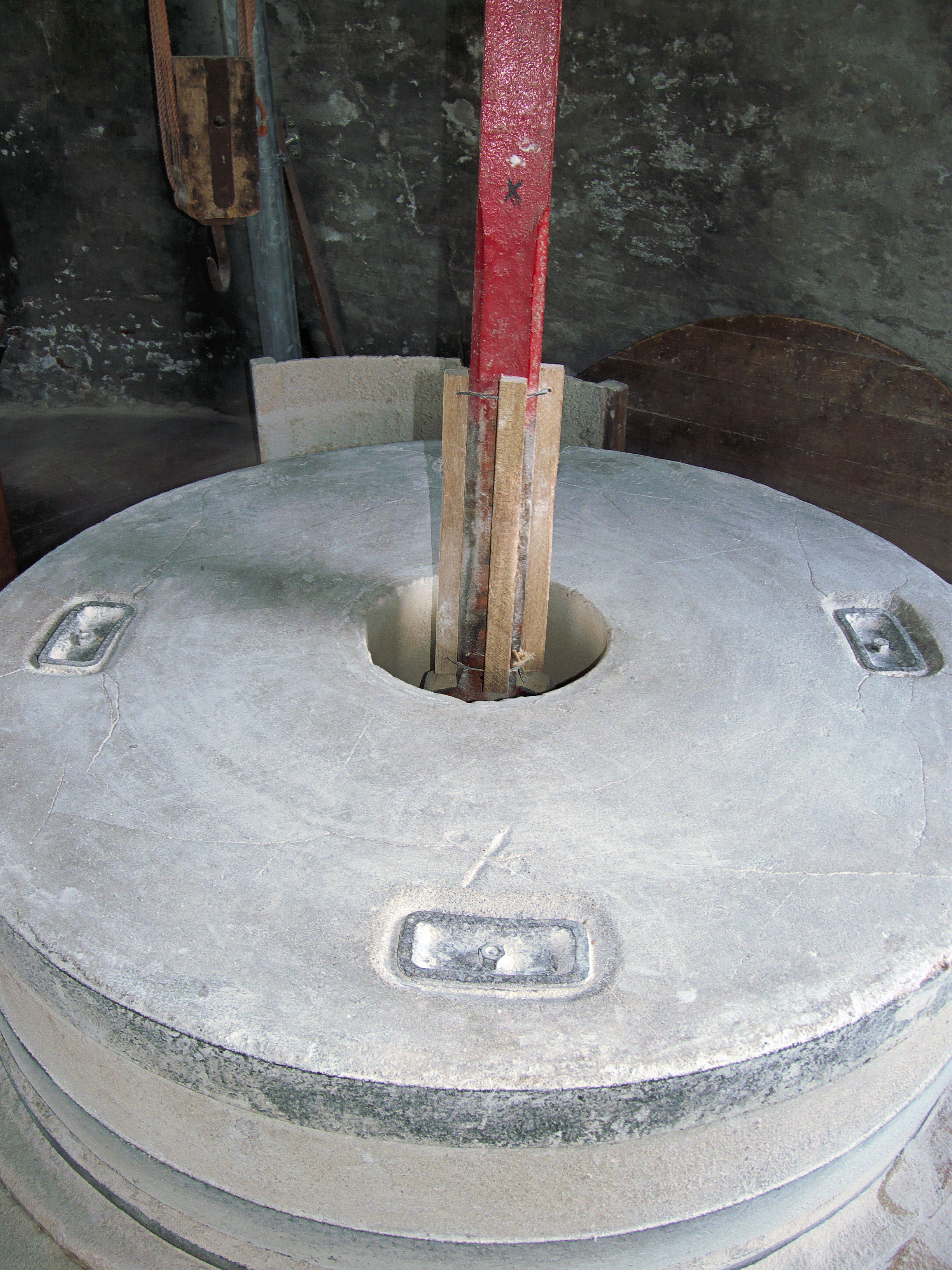 De Hoop Garderen ontmantelde maalstoel